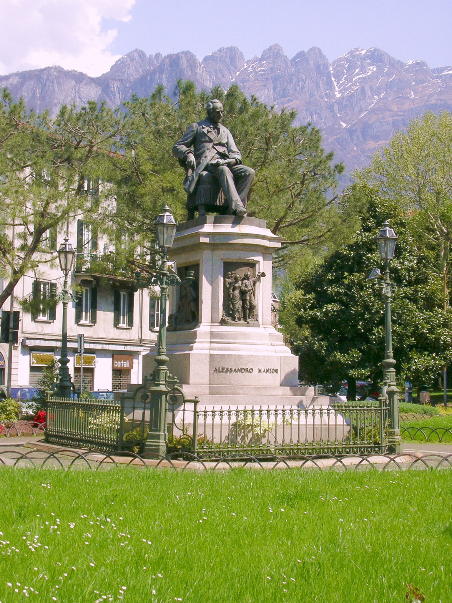 Monumento ad Alessandro Manzoni a Lecco. Sullo sfondo il monte Resegone.